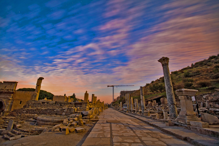 efeso